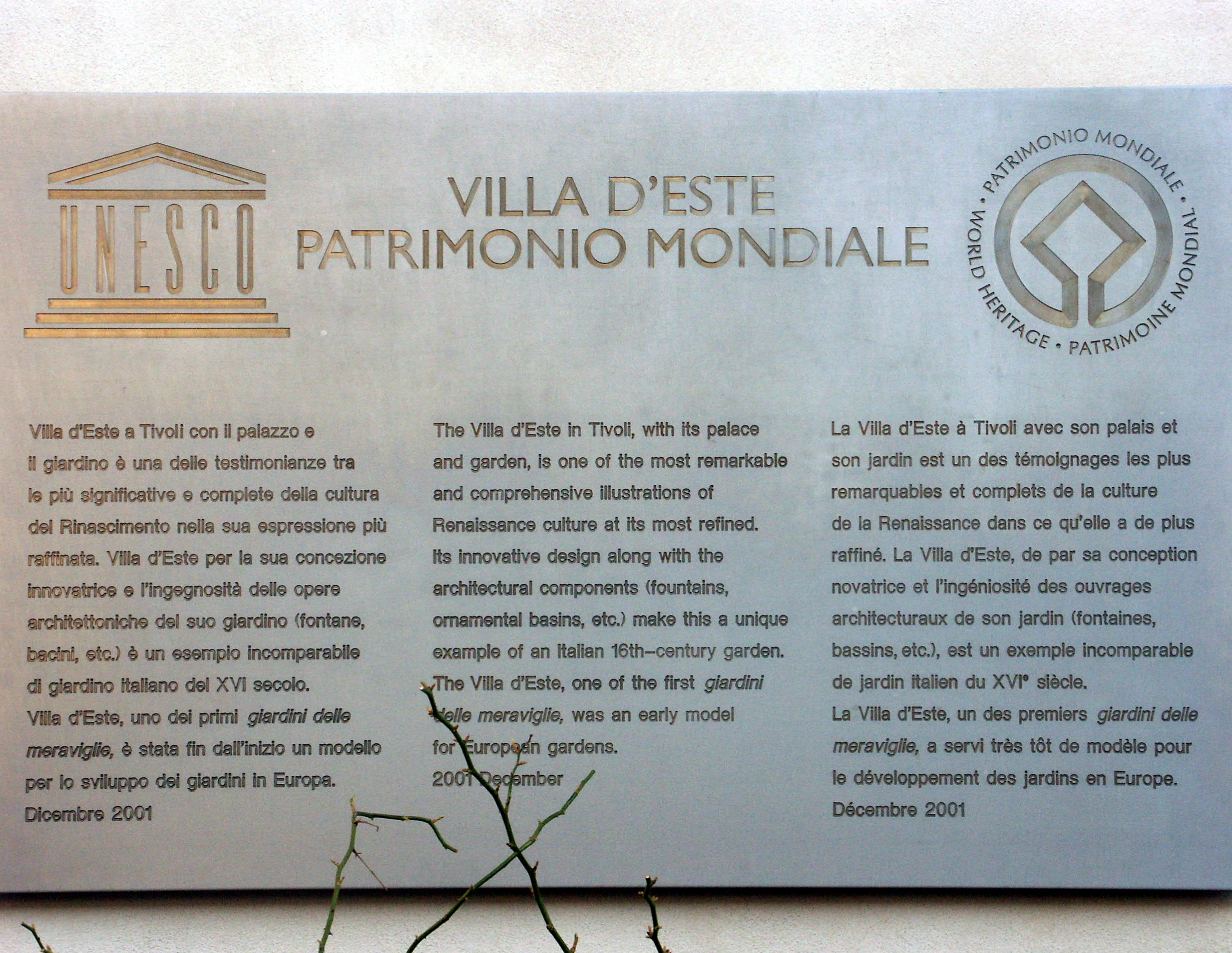 Tivoli, Villa d'Este, UNESCO-Tafel